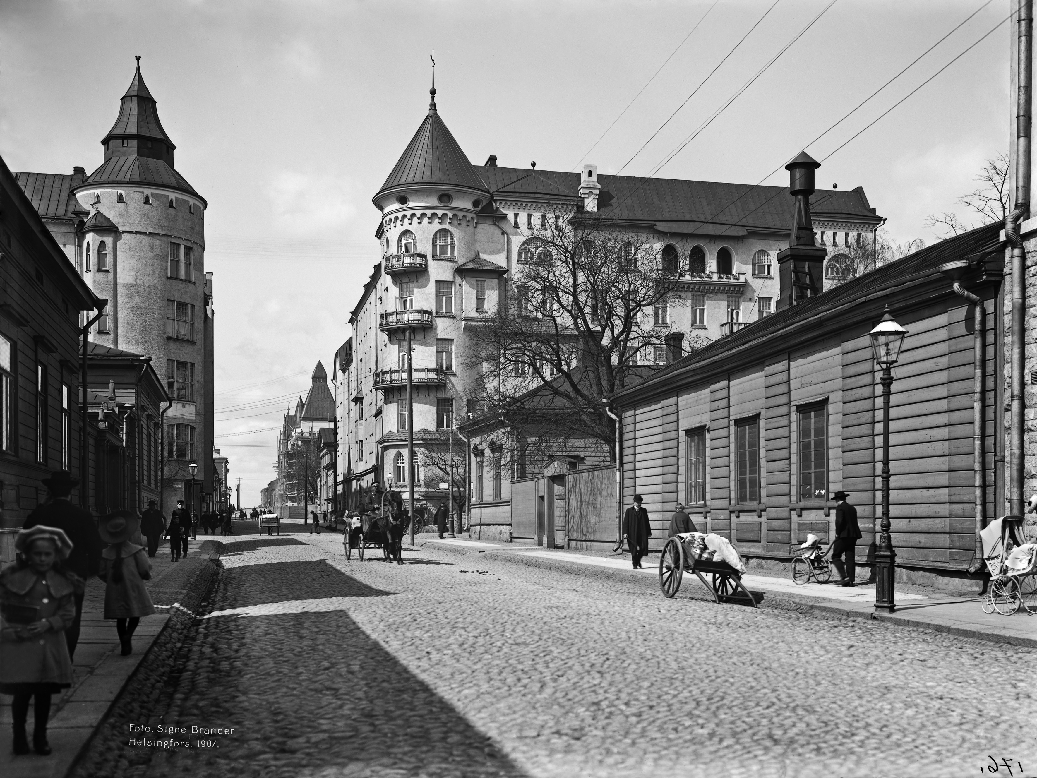 Fredrikinkatu 37, 39.; negatiivi ja vedos, lasi paperi pahvi, mv